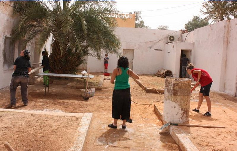 Bénévoles espagnoles dans le vieux marché a beni abbes.